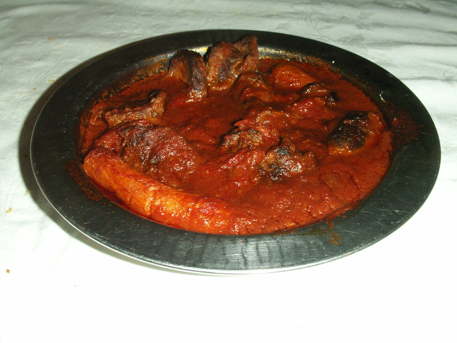 brasato al sugo